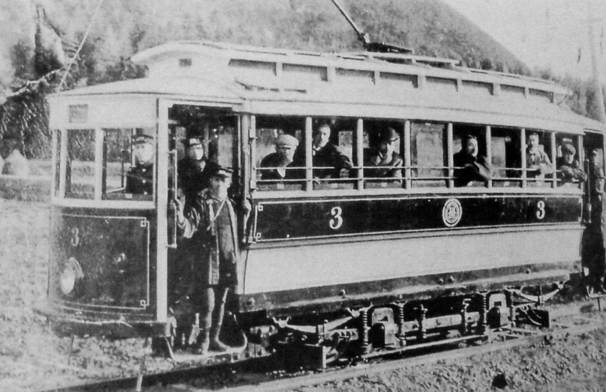 長良軽便鉄道3号